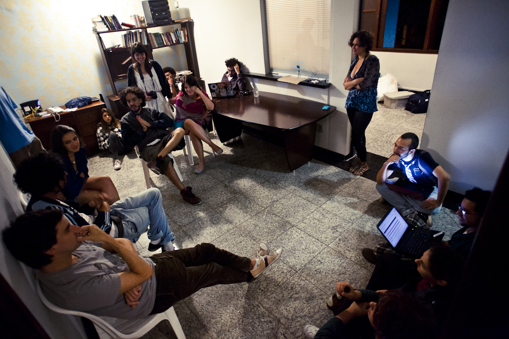 Chegada da Invasão Hacker na inauguração da Casa Fora do Eixo Minas 21/04/2012 (CC BY-SA) Fora do Eixo